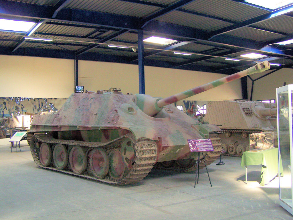 JAGDPANTHER - MUSEE DES BLINDES SAUMUR